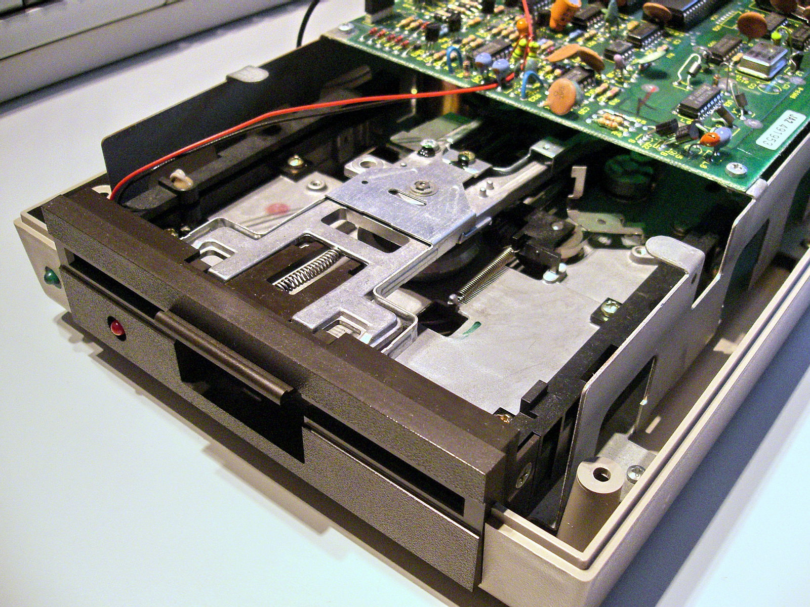 Commodore VC1541 Laufwerksmechanik